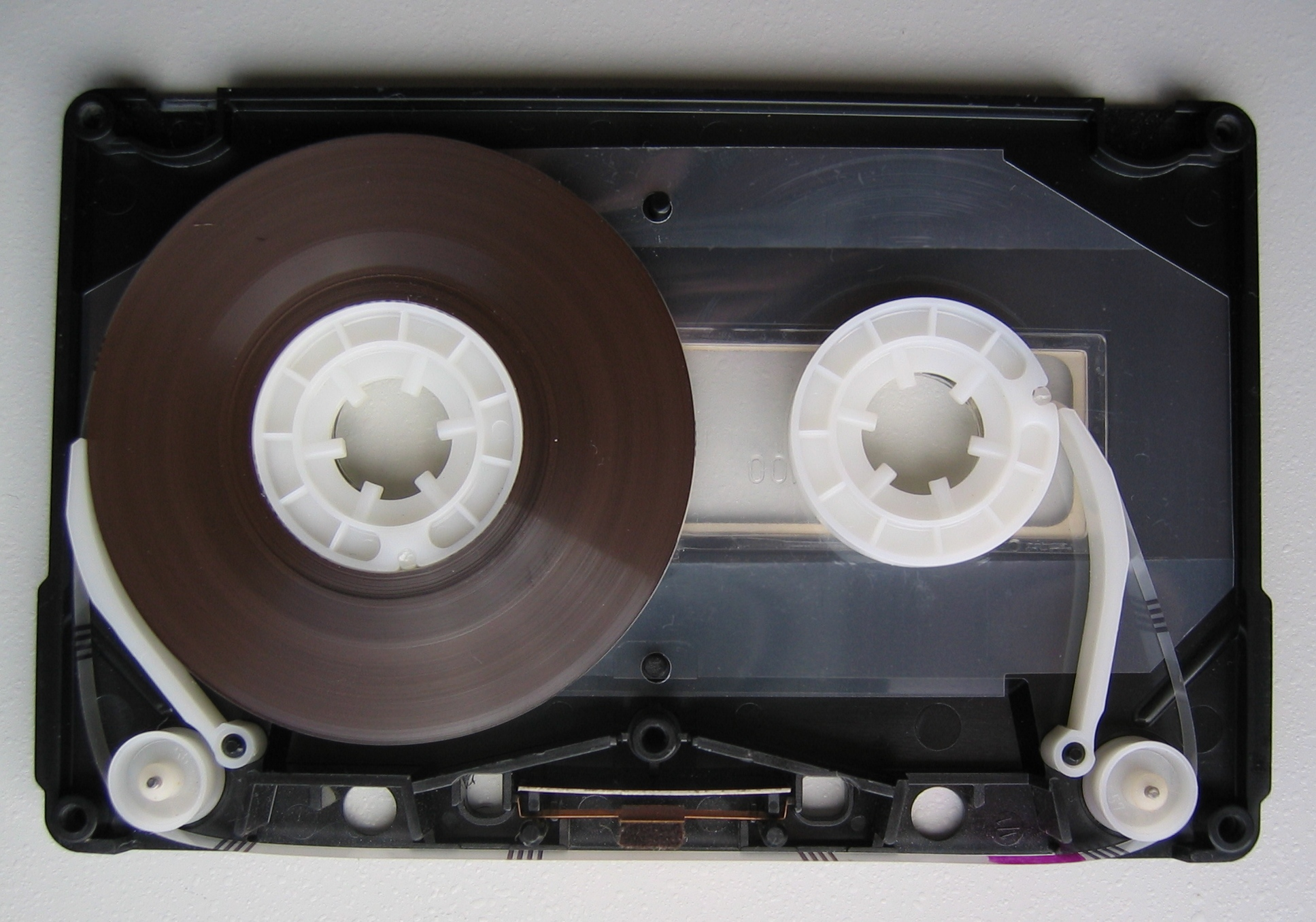 Compact Cassette BASF SM IEC I